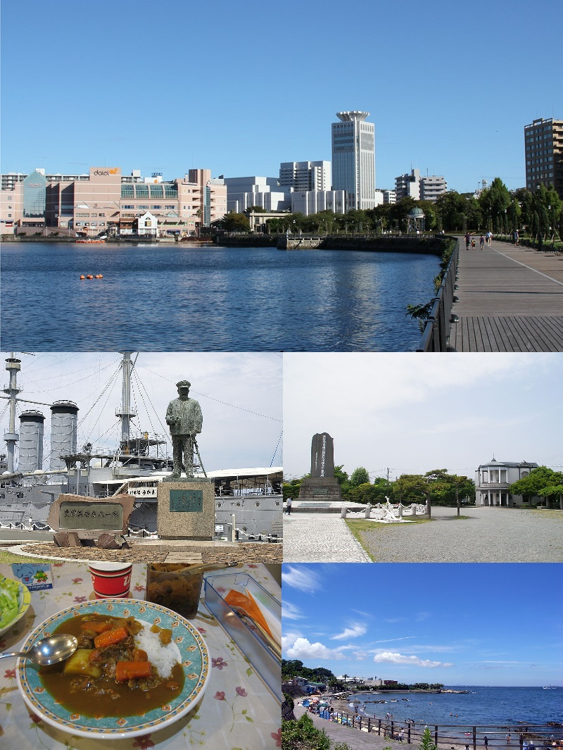 神奈川県横須賀市のモンタージュ画像。